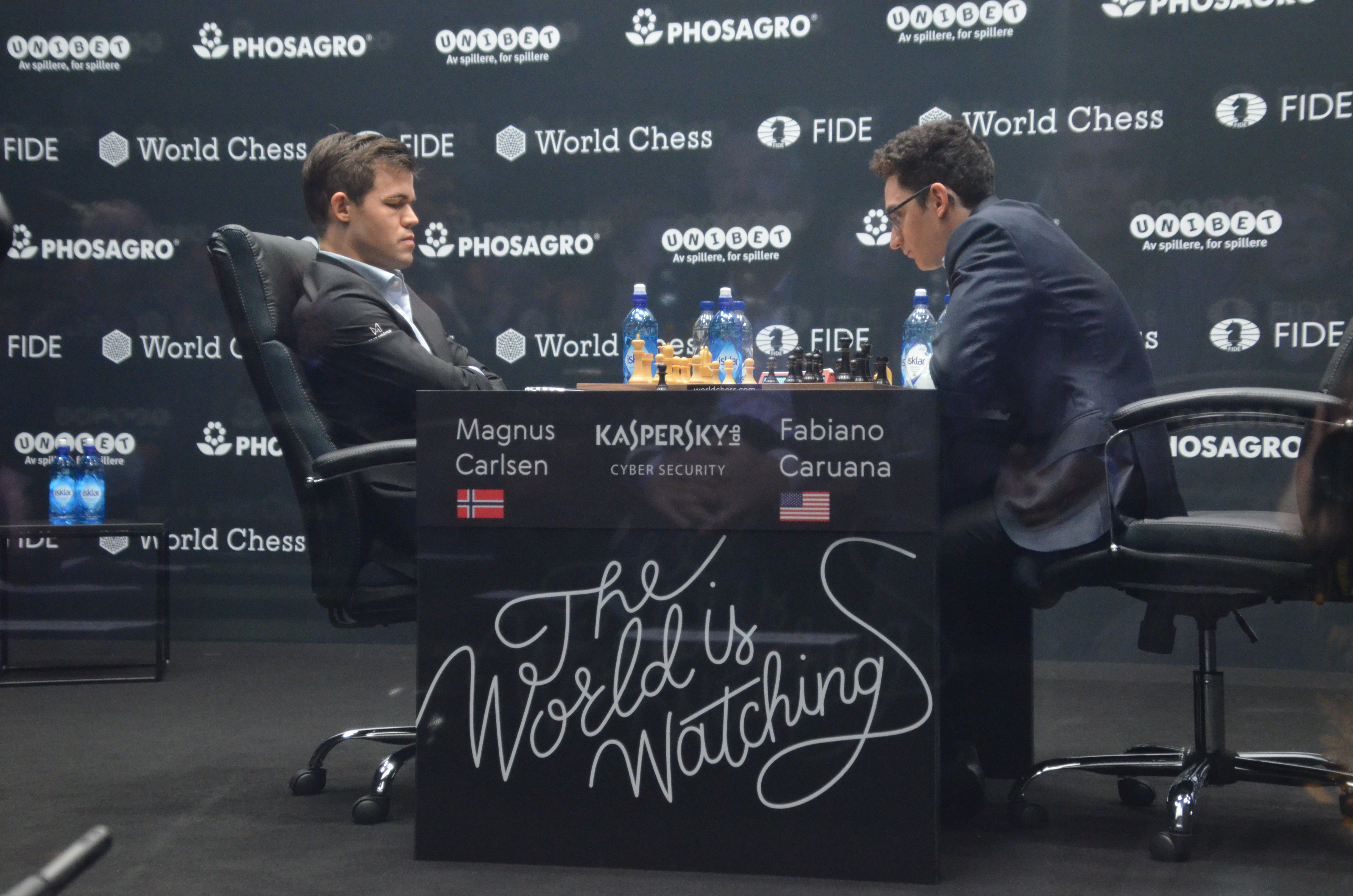 Carlsen-Caruana, novena partida del match por Campeonato del Mundo, Londres 2018